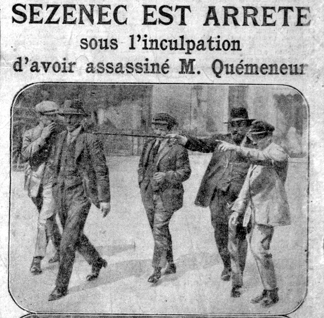 Annonce de l'arrestation de Guillaume Seznec dans Le Journal du 1er juillet 1923. De gauche à droite : un cheminot, le commissaire Achille Vidal, un seconde cheminot, Guillaume Seznec et enfin l'inspecteur Pierre Bonny.